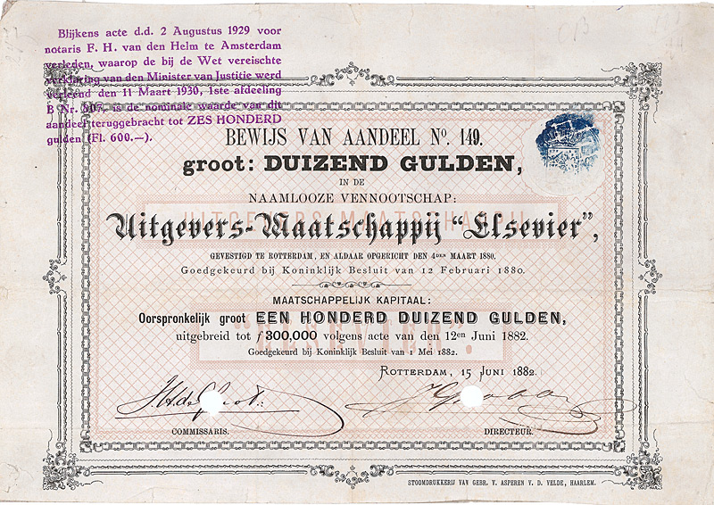 Aktie vom Verlag Esevier vom 15. Juni 1882